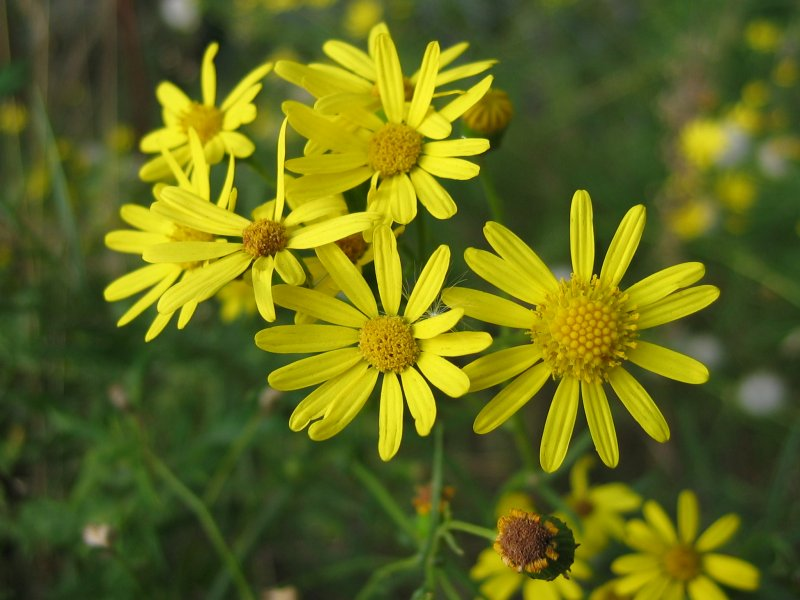 Schmalblättriges Greiskraut Senecio inaequidens, Rostock